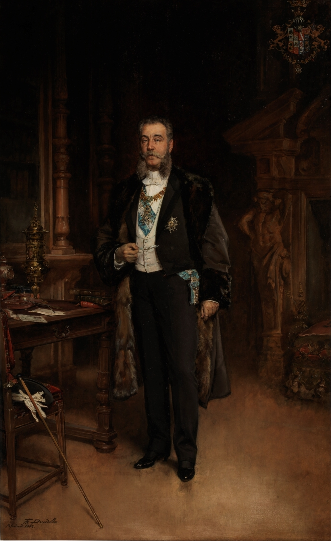 Retrato del aristócrata y político español José de Murga y Reolid (1833-1902), primer marqués de Linares y primer vizconde de Llanteno.